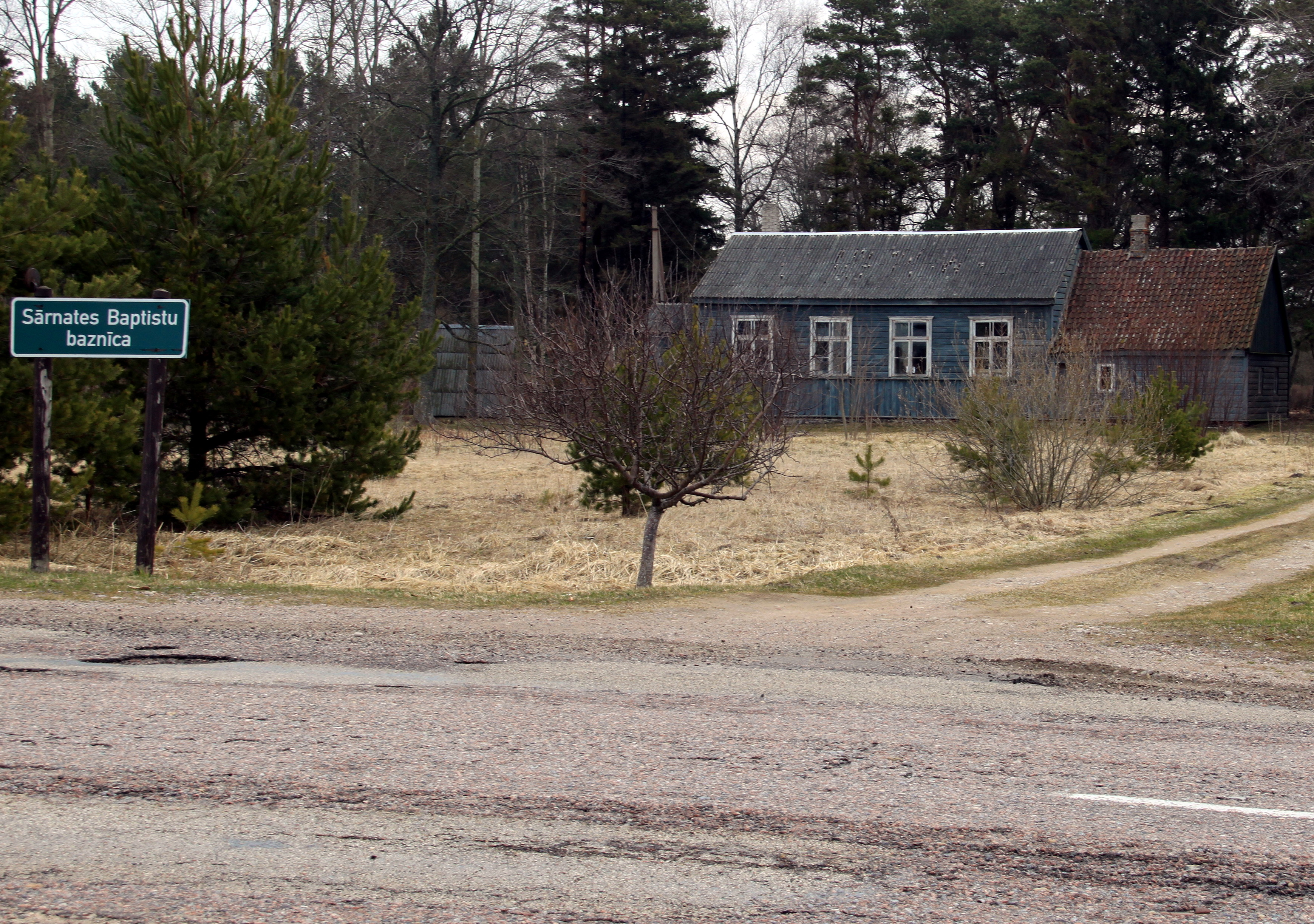 Sārnates baptistu baznīca 2011